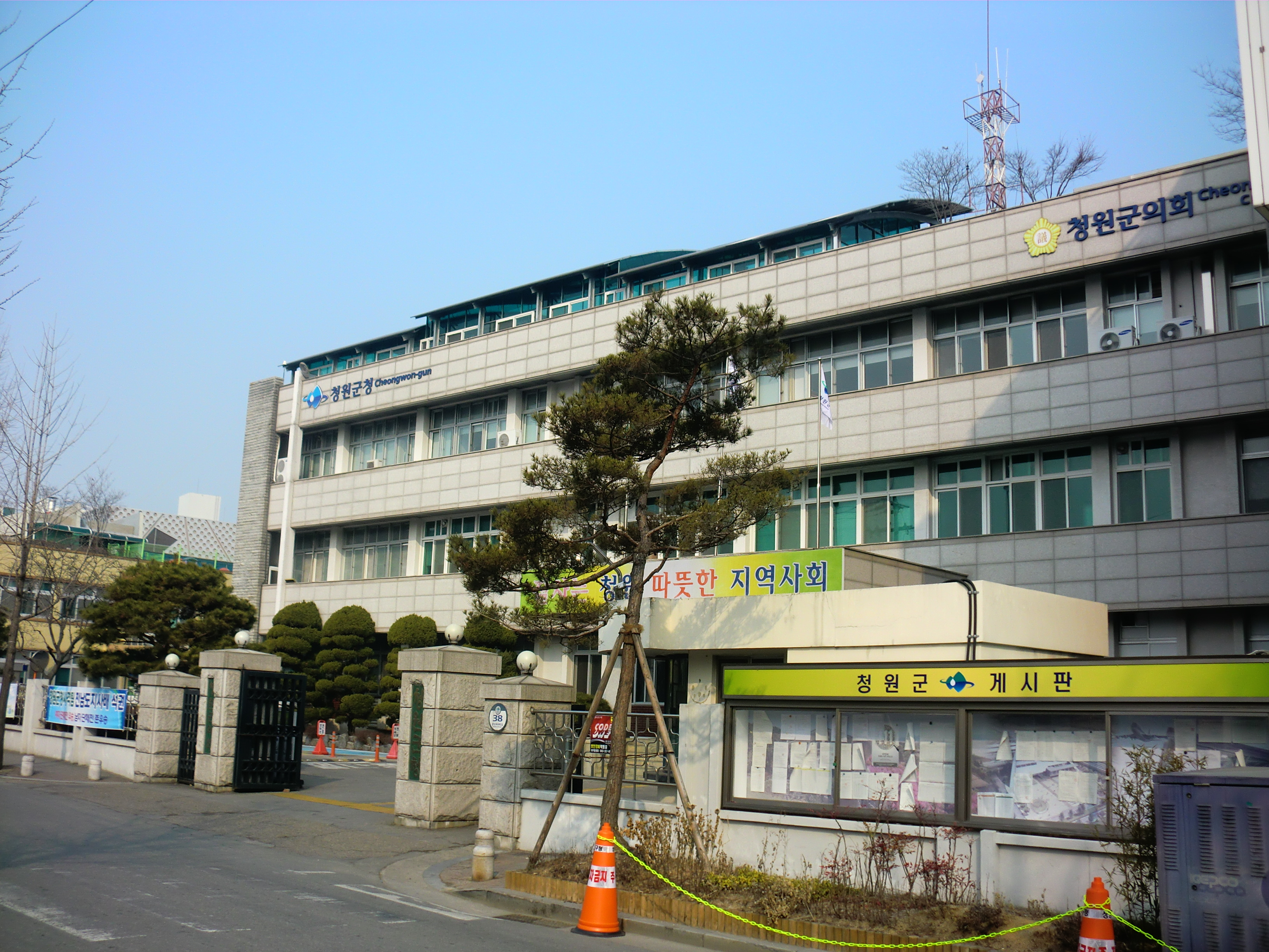 충청북도 청주시에 있는 청원군청